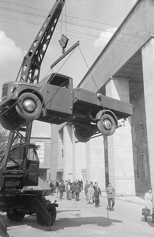 Original image description from the Deutsche Fotothek Ein Barkas Framo V 901 der Industrieverwaltung Fahrzeugbau (IFA) an einem Kran auf dem Freigelände der Technischen Messe 1953 hängend